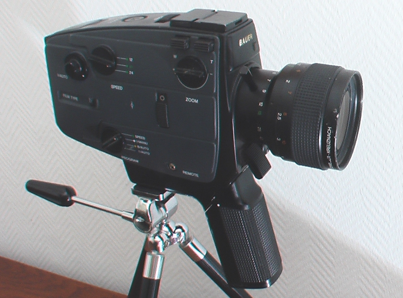 Super8KameraBauerA512Rechts